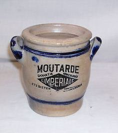 Pot de moutarde en grès; marque Impériale, Jambes (vers 1945).